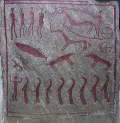 slab of the "King's Grave"; compare Image:Kiviksgraven, en av hällarna, Nordisk familjebok.png, Image:Kiviksgraven_slab_1.jpg